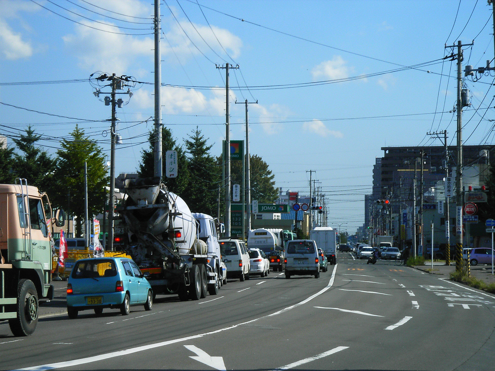 Miyagi Prefectural Road 137, Arahama-Haranomachi Line. Sendai, Miyagi prefecture, Japan.